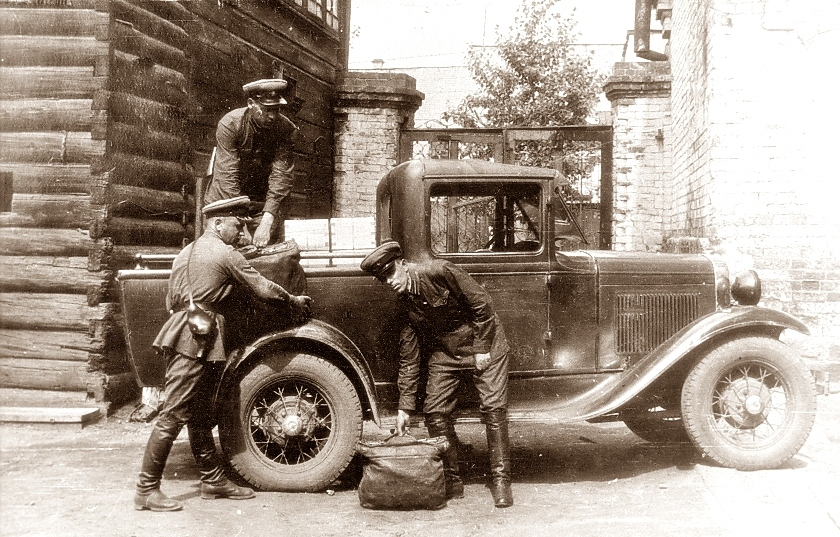 Архивная фотография фельдъегерей спецсвязи